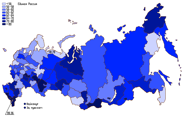 Результаты политической партии "Единая Россия" на парламентских выборах 2007 года (по регионам)